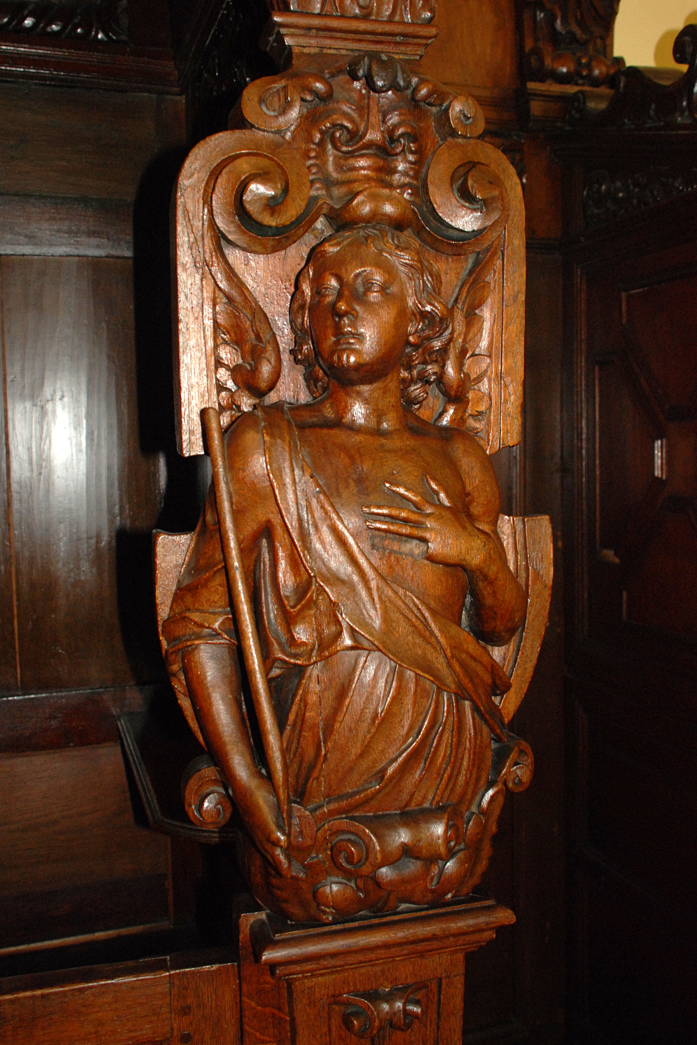 Belgique - Brabant wallon - Mont-Saint-Guibert - Église Saint-Guibert - Confessionnaux